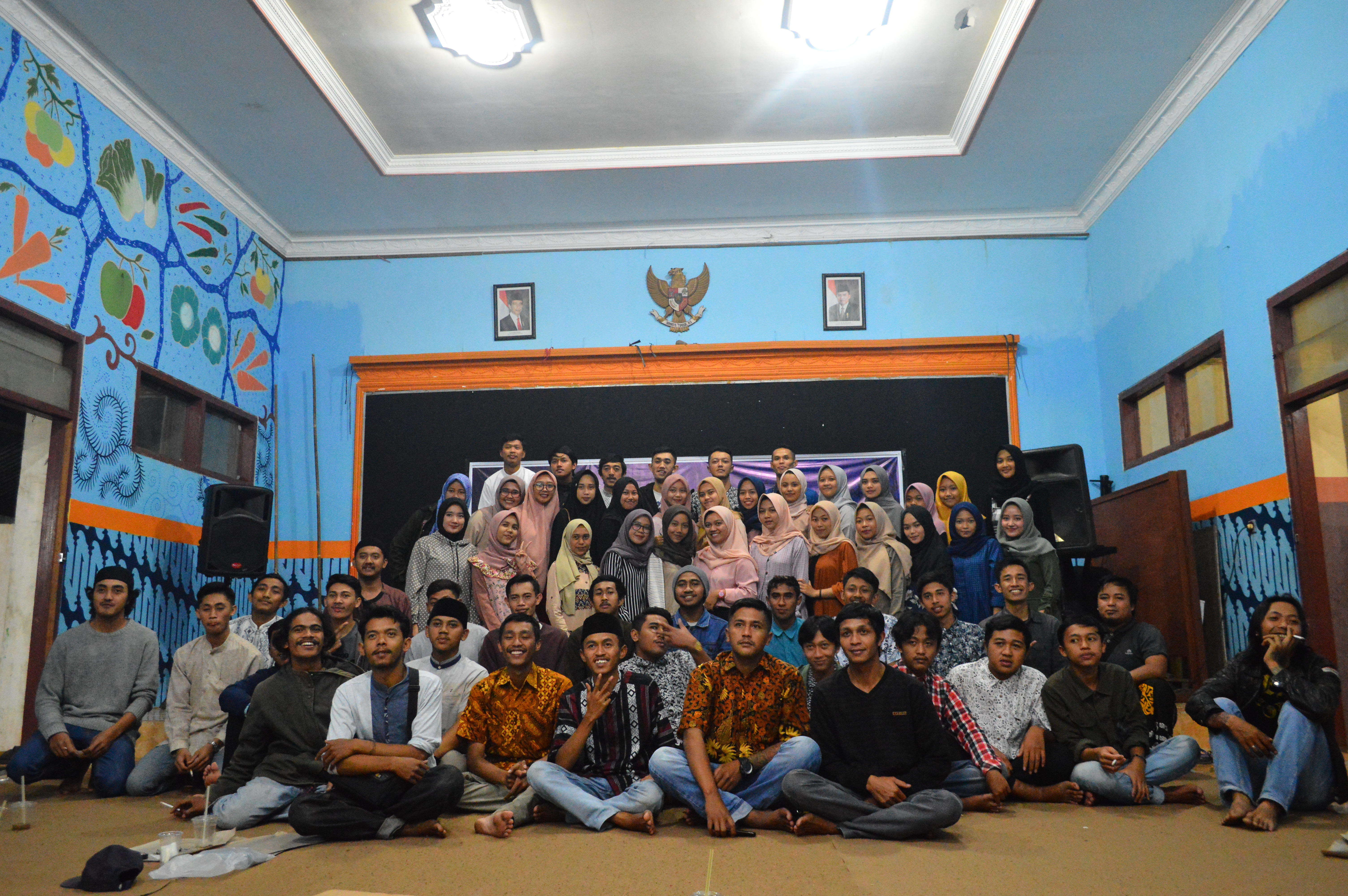 Selepas buka bersama dan diskusi ringan